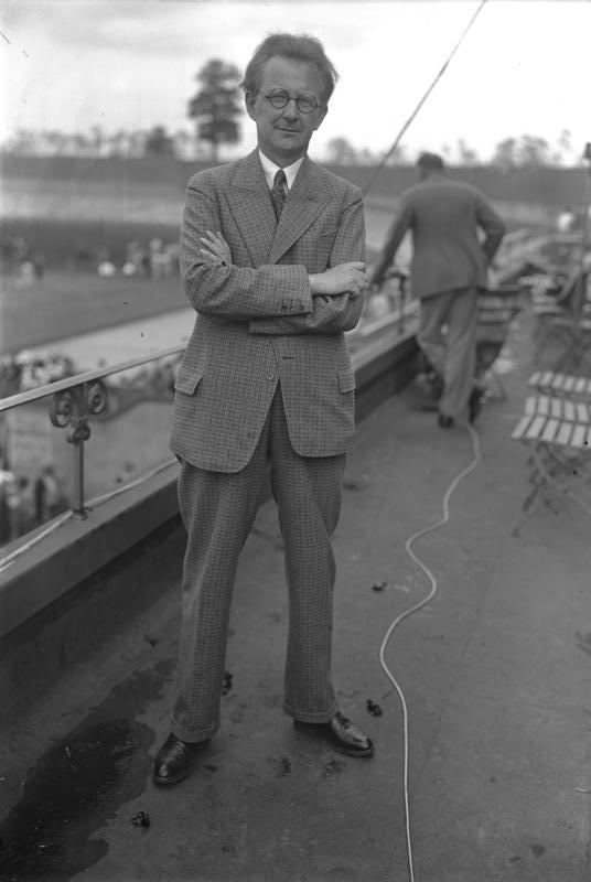 Der Reichskunstwart Redslob, welcher die künstlerische Oberleitung für die Feier am Verfassungstag innehat.